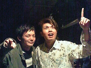 三日月マンハッタン